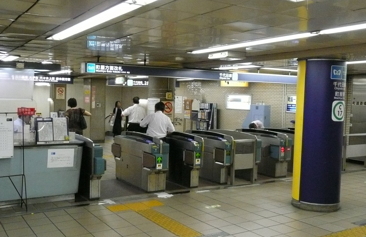 東京地下鉄町屋駅町屋方面改札口